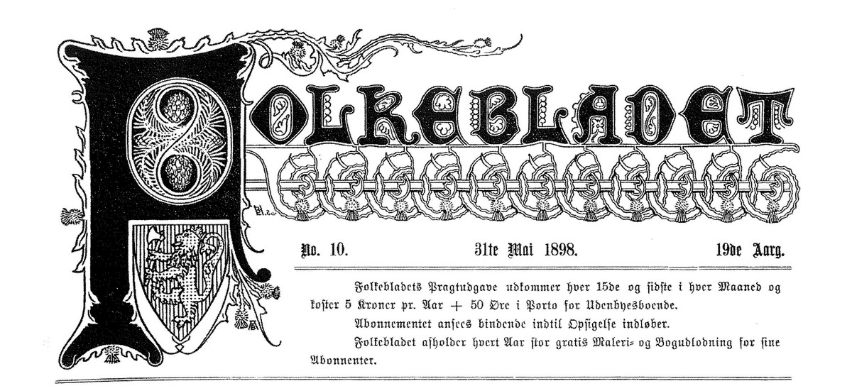 Logoen til Folkebladet 1898